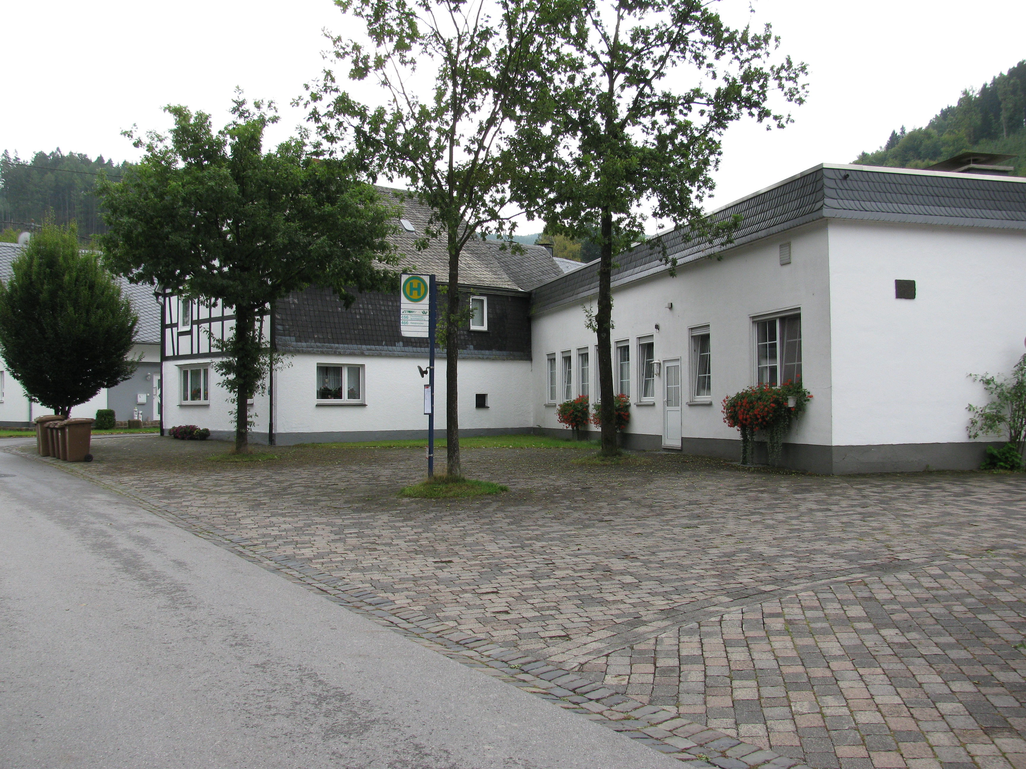 die Bushaltestelle Kirche in der Uentropstraße an der Schützenhalle in Schmallenberg-Lenne